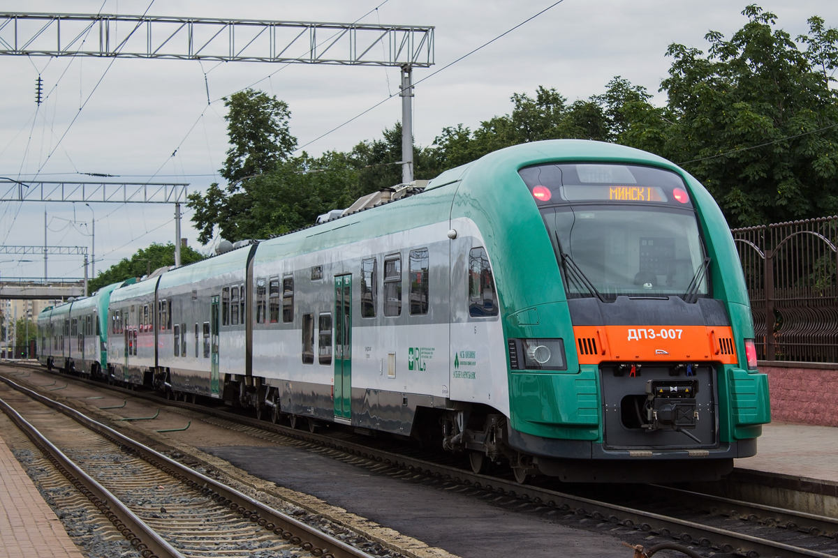 Сдвоенный дизель-поезд ДП3-007+005 (модель Pesa 731M) рейсом № 805 Минск — Вильнюс на станции Минск-Пассажирский, Белоруссия